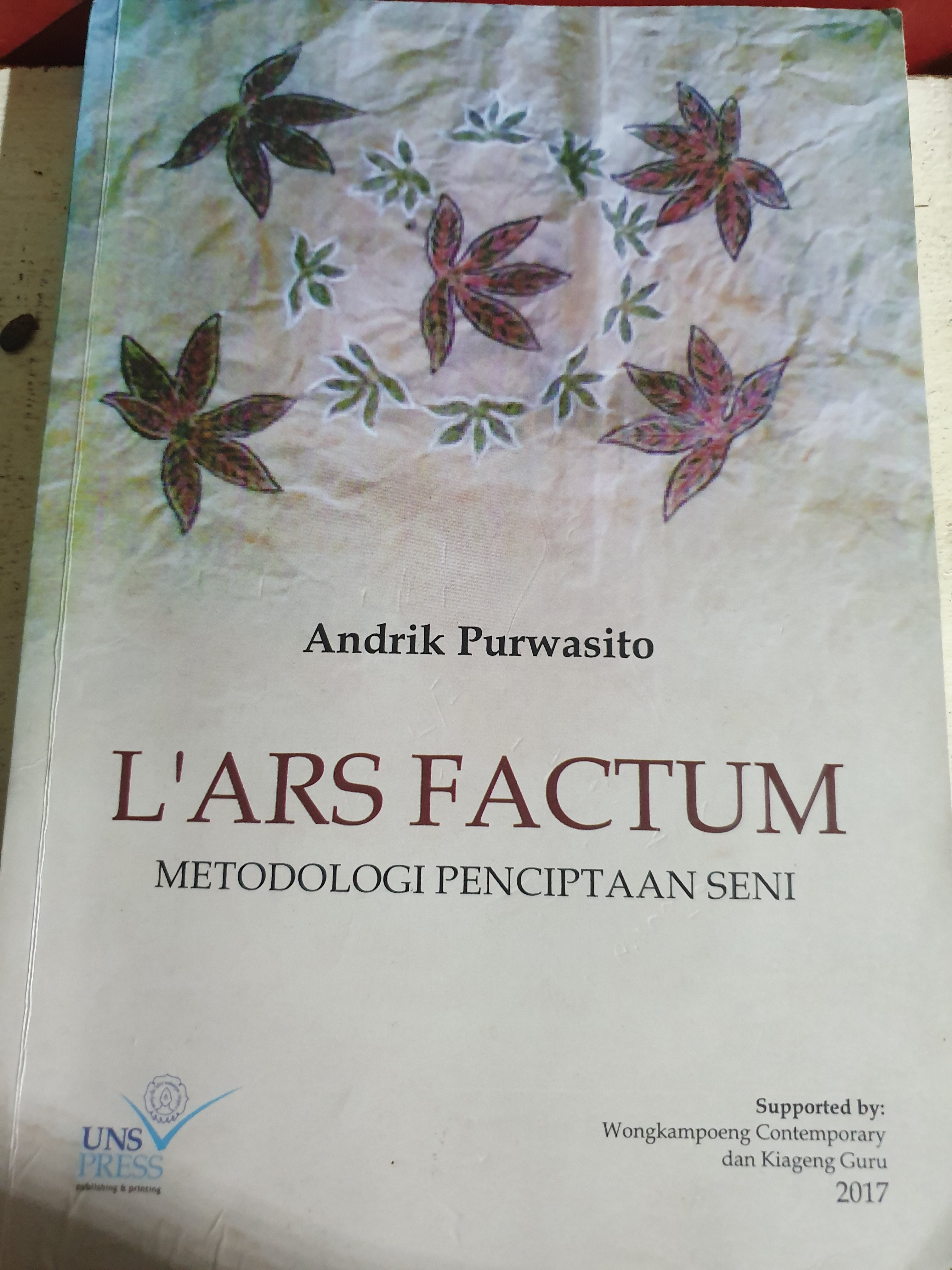 Buku Metodologi Penciptaan Seni